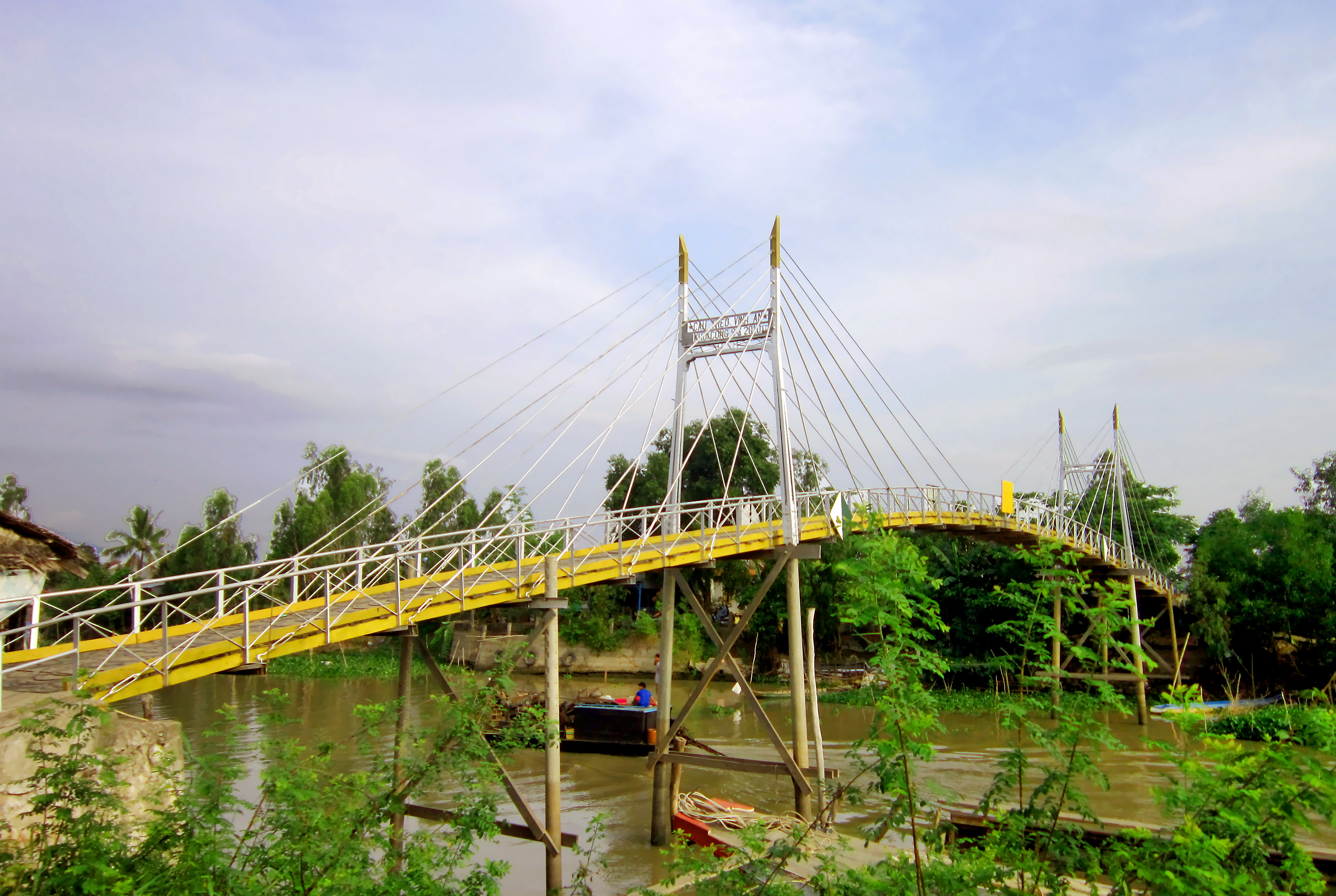 Cầu dây văng Vĩnh An, thuộc xã Vĩnh An, huyện Châu Thành, An Giang, Việt Nam.